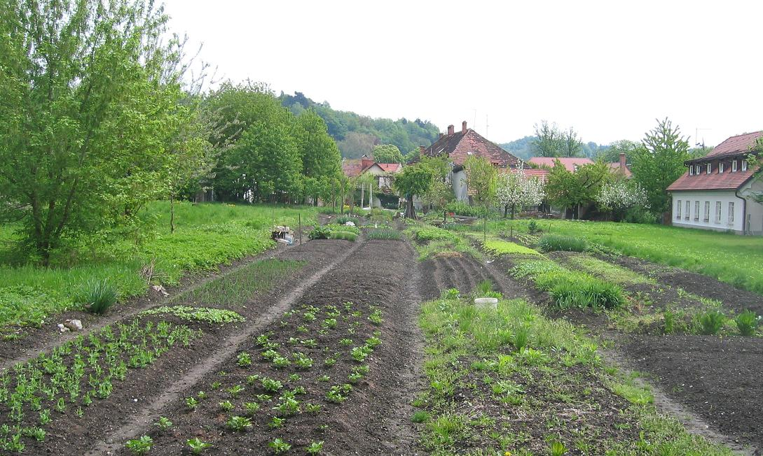 Krakovo ("Trnovo gardens"), Ljubljana photo:Ziga 16:14, 3 May 2006 (UTC)